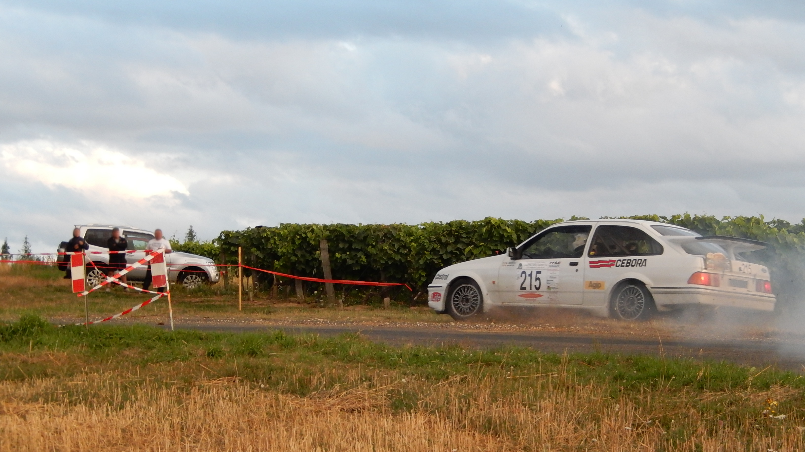 Le petit dérapage de la Ford Sierra Cosworth de Jean-Hugues Payen et Arnaud Fieffe dans un des virages de la huitième spéciale du Rallye de Saintonge, le 22 juillet 2017.